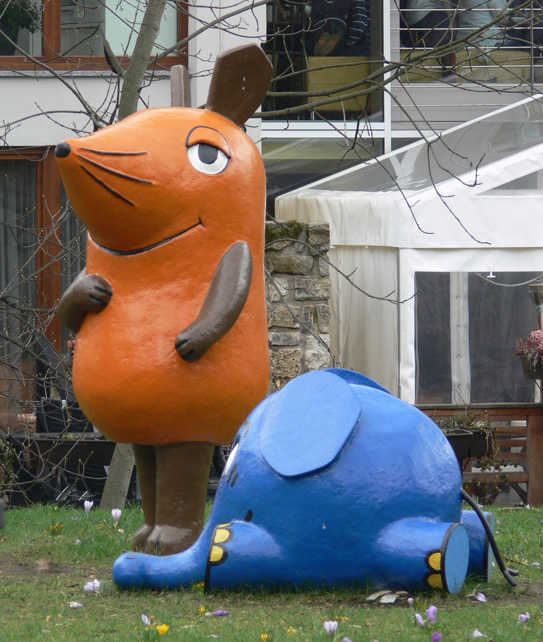 Figuren "Maus" und "Elefant" aus der WDR-Sendung "Die Sendung mit der Maus", erstmalig aufgestellt an der Rathausbrücke in Erfurt. Neuer Standort ist der Anger (vor Hauptpostamt).